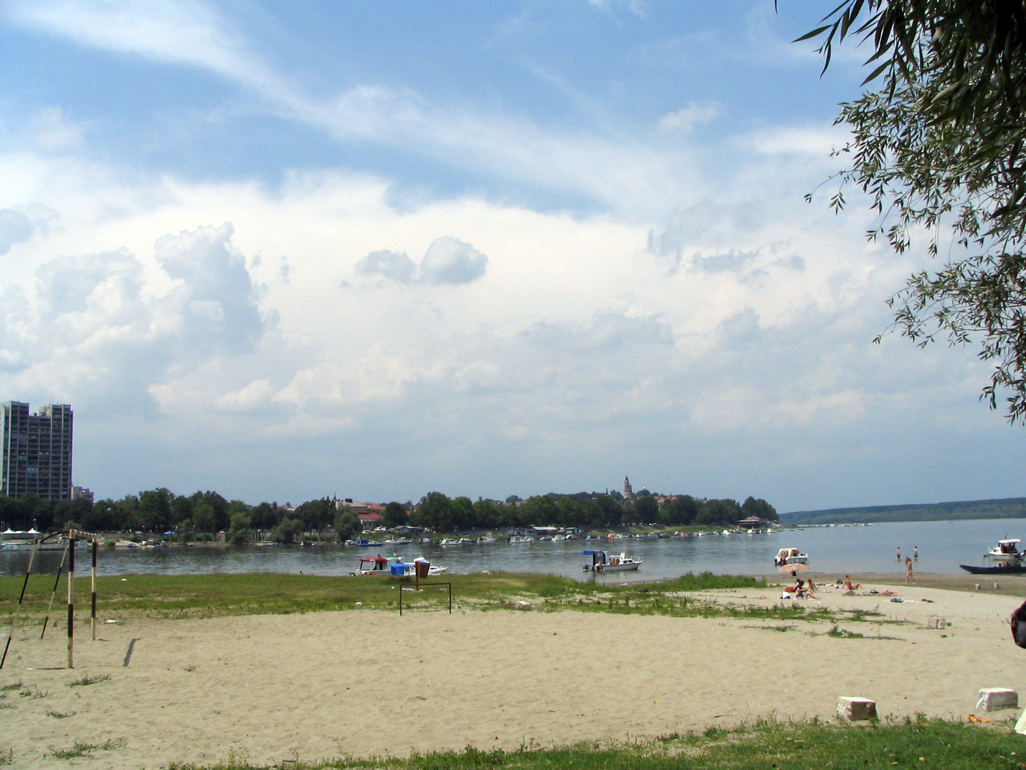 Плажа Лидо на Великом ратном острву и поглед на Земун(фото: Михаило Грбић, 16.јуни 2007.)